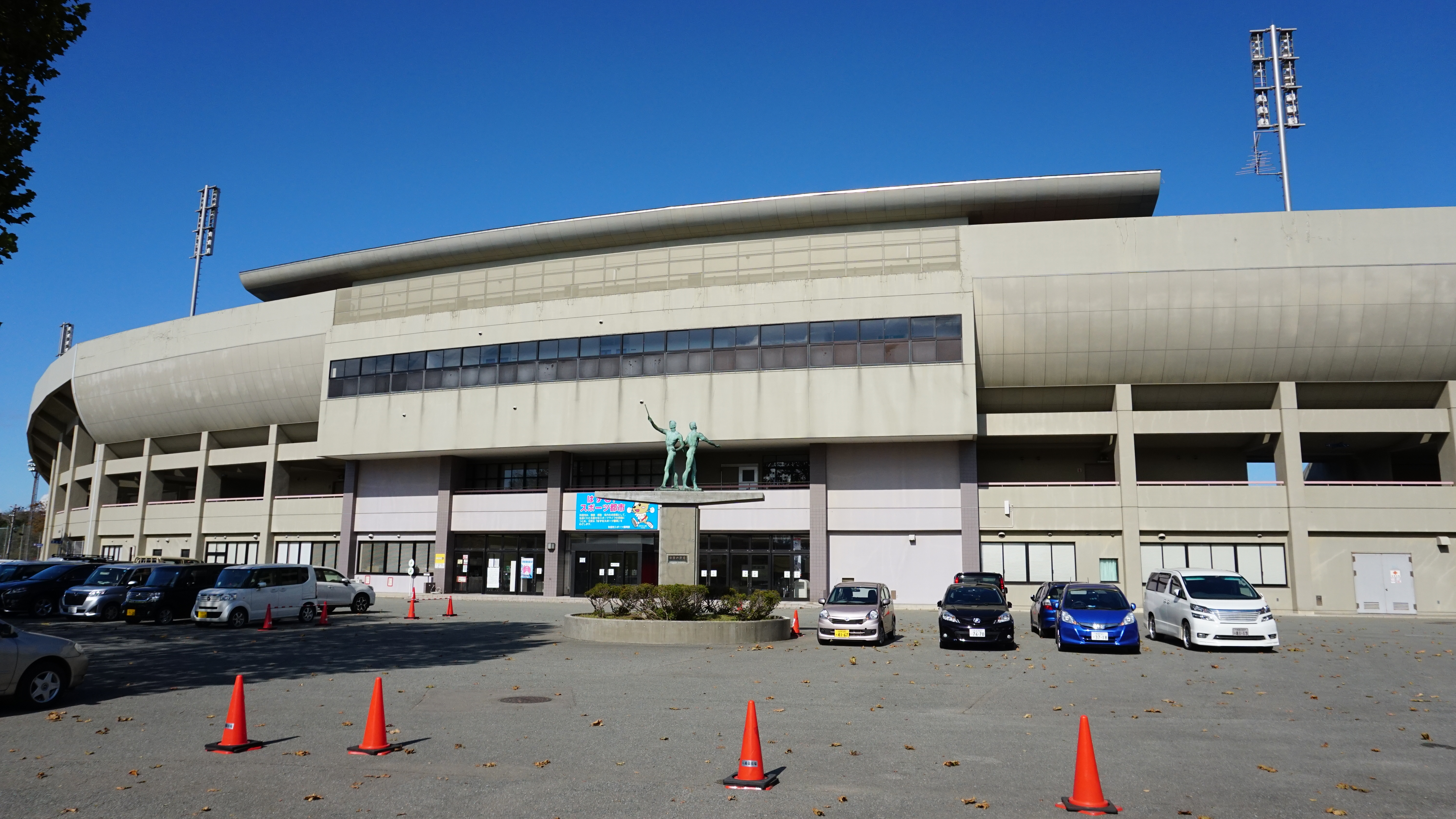 秋田市営八橋陸上競技場